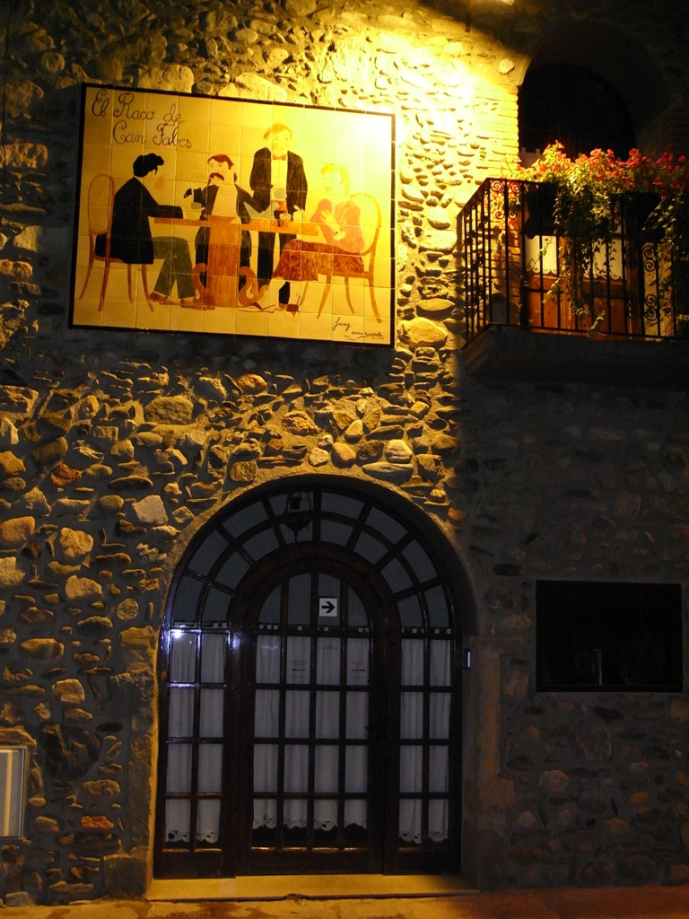 Façana de Can Fabes, restaurant fundat per Santi Santamaria.